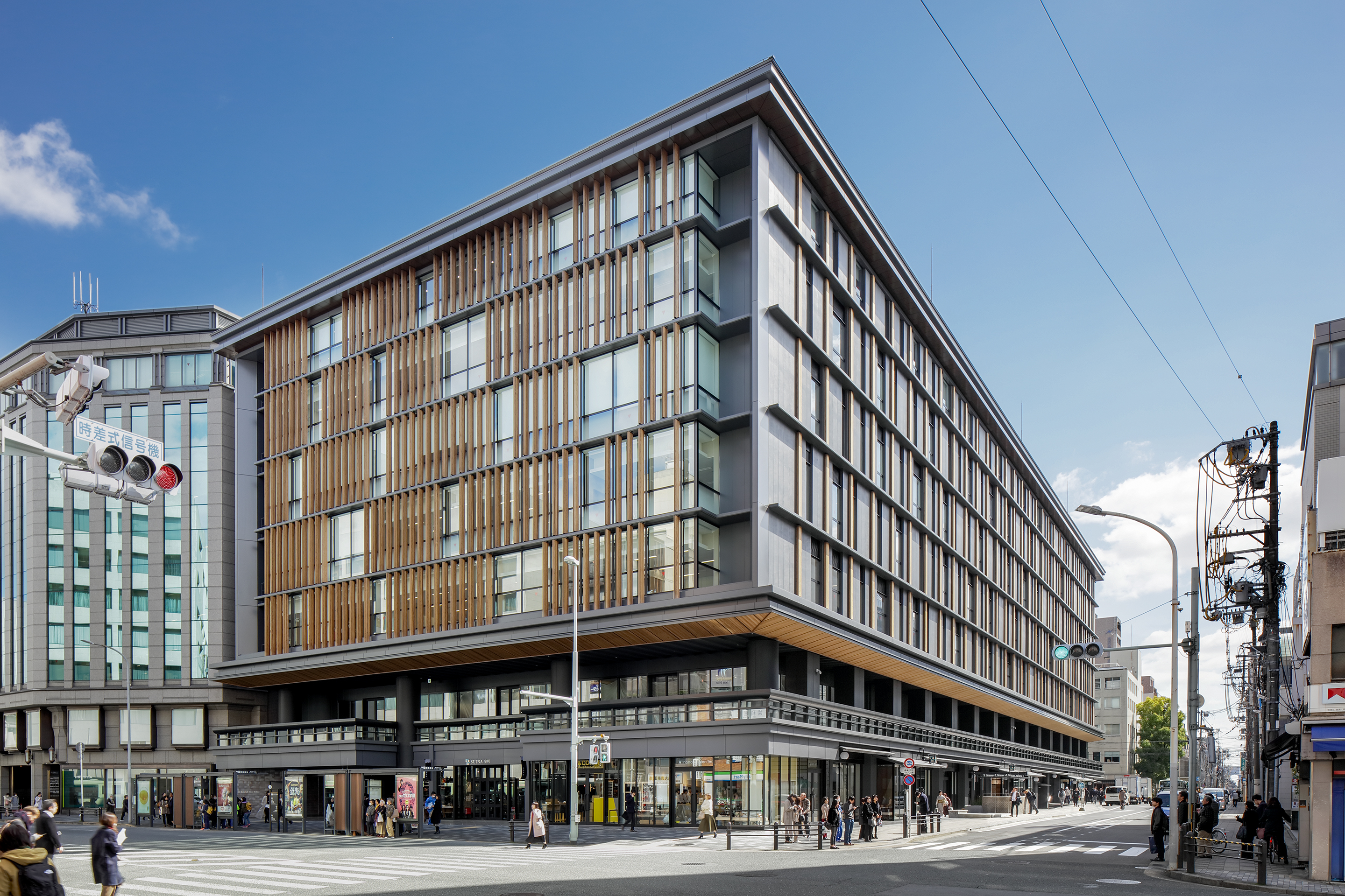 京都経済センター外観（２０１９年３月撮影）